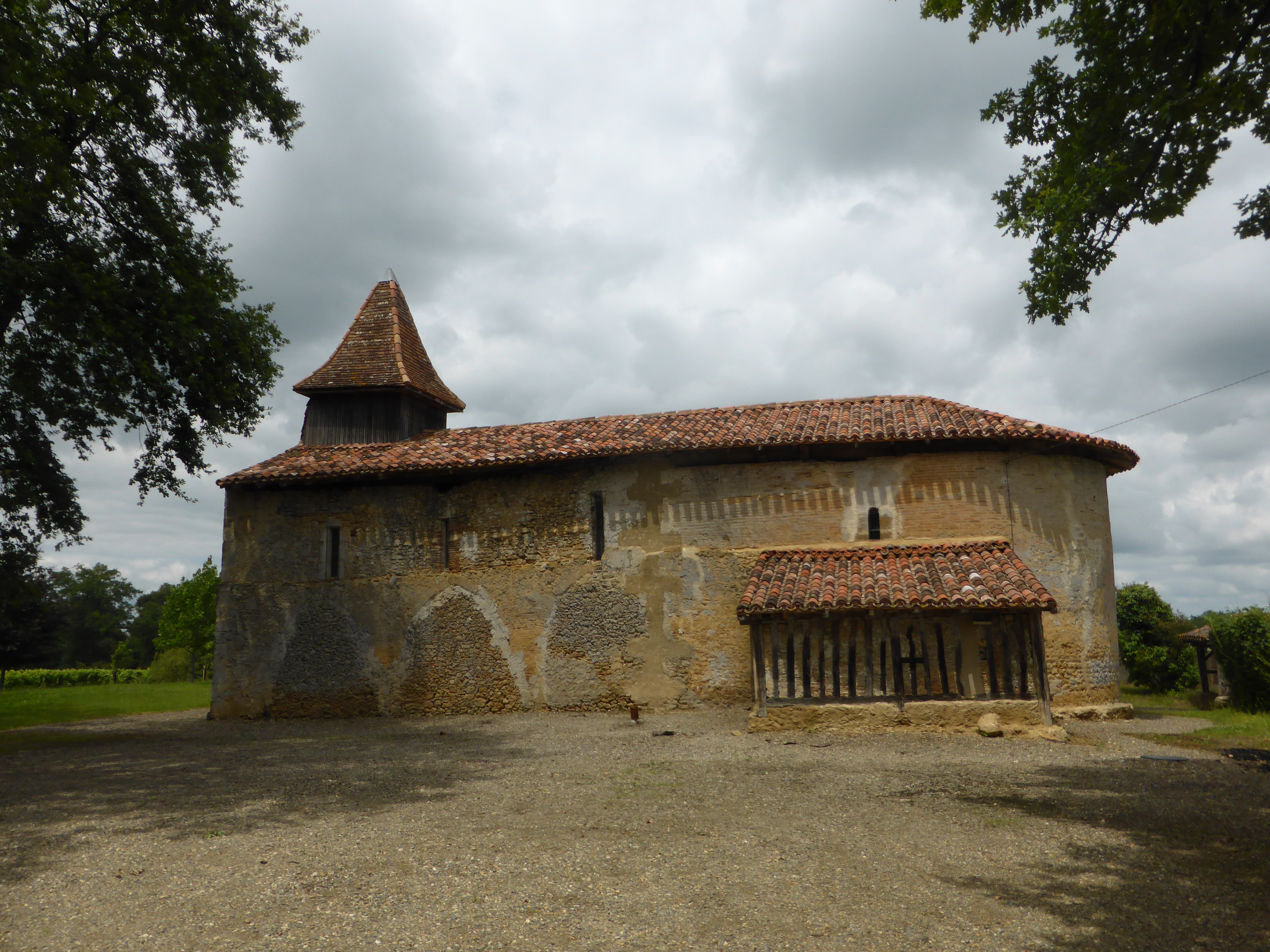 Église du Pin, sur la commune d'Ayzieu, dans le Gers